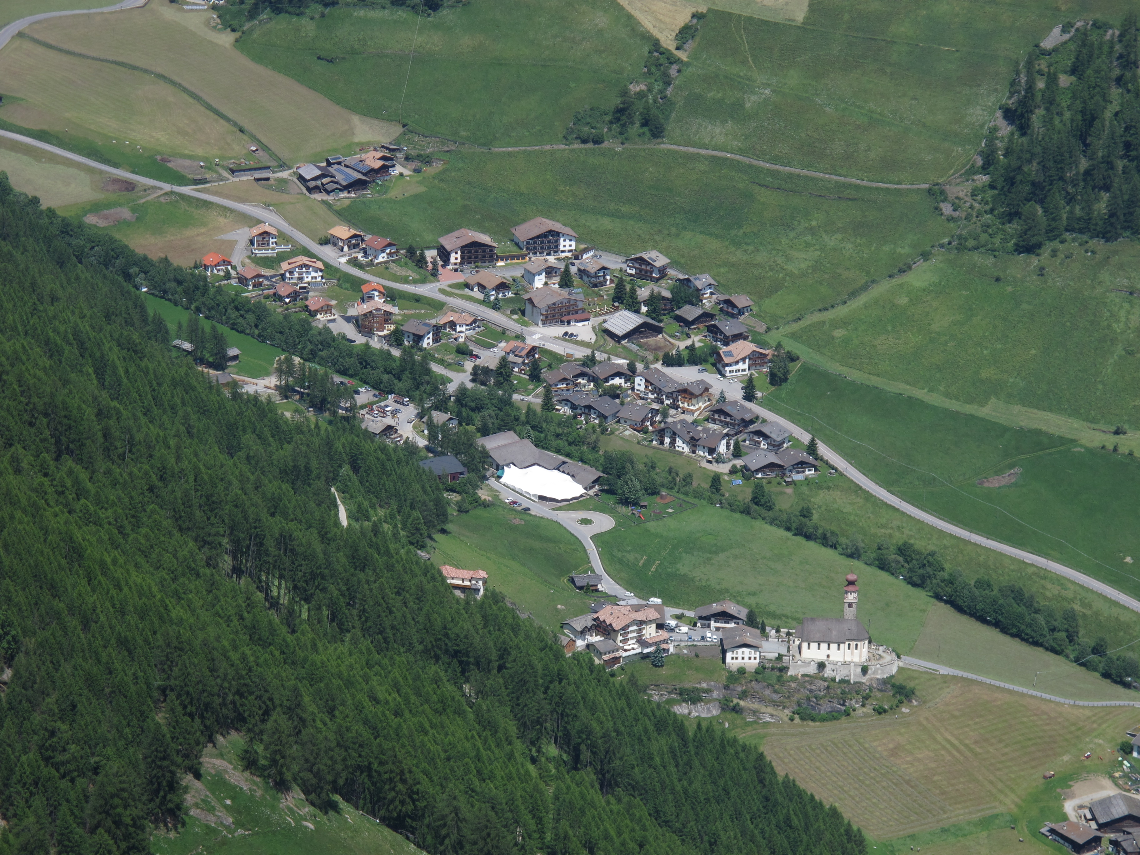 Das Dorf "Unser Frau im Schnalstal" in Südtirol, Sicht von oben, rechts unten die Wallfahrtskirche